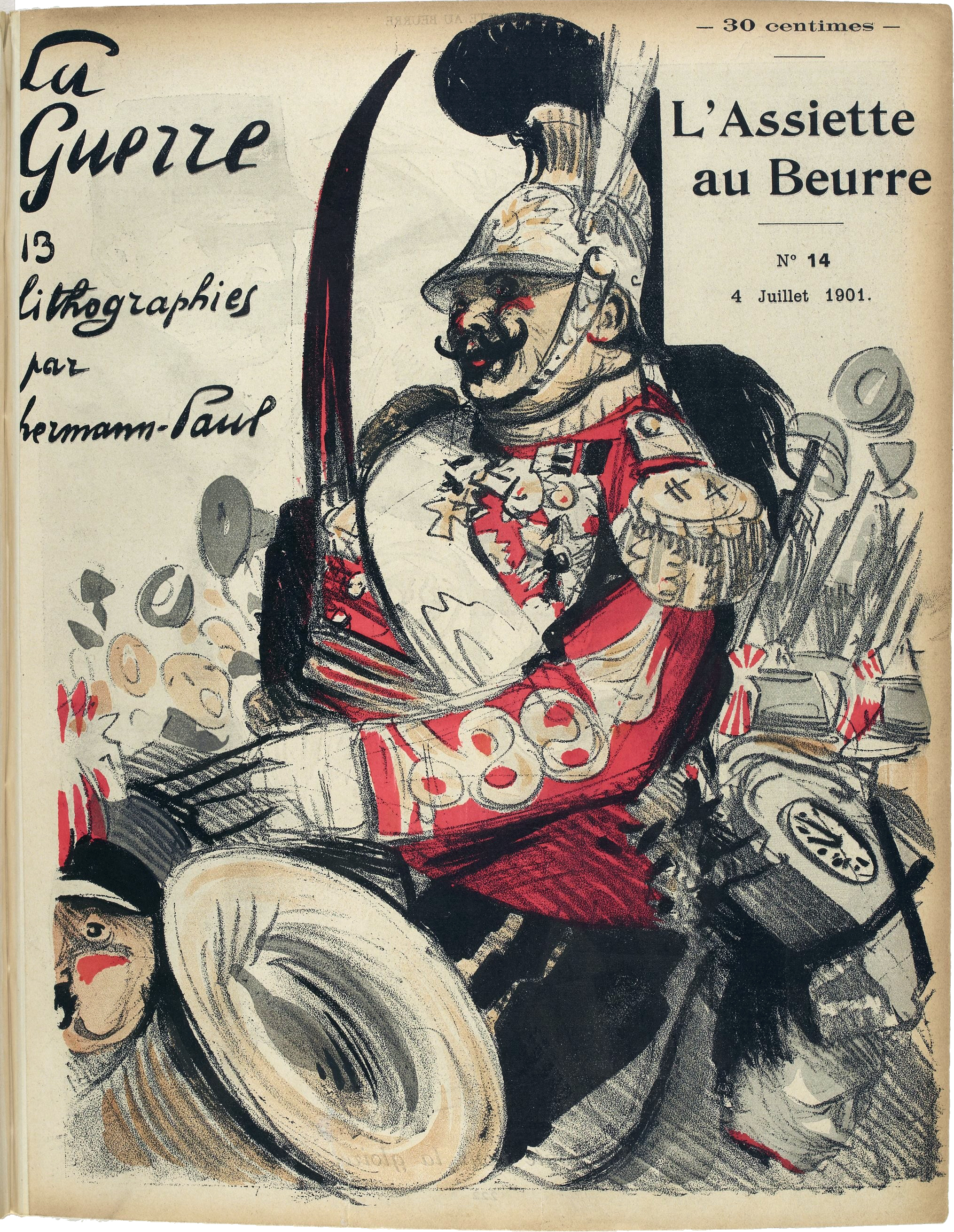 Cover